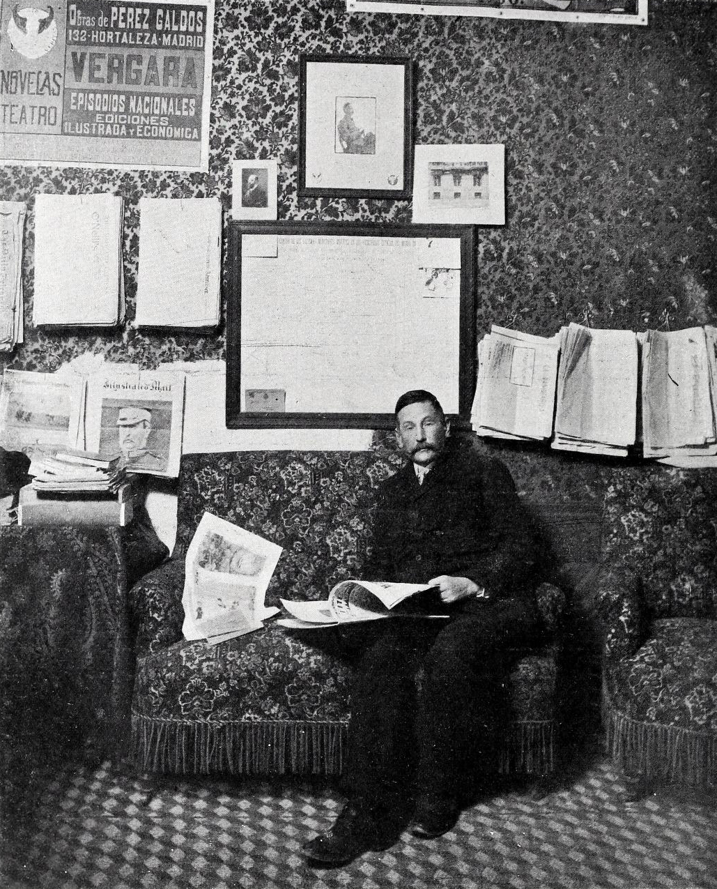 Benito Pérez Galdós.